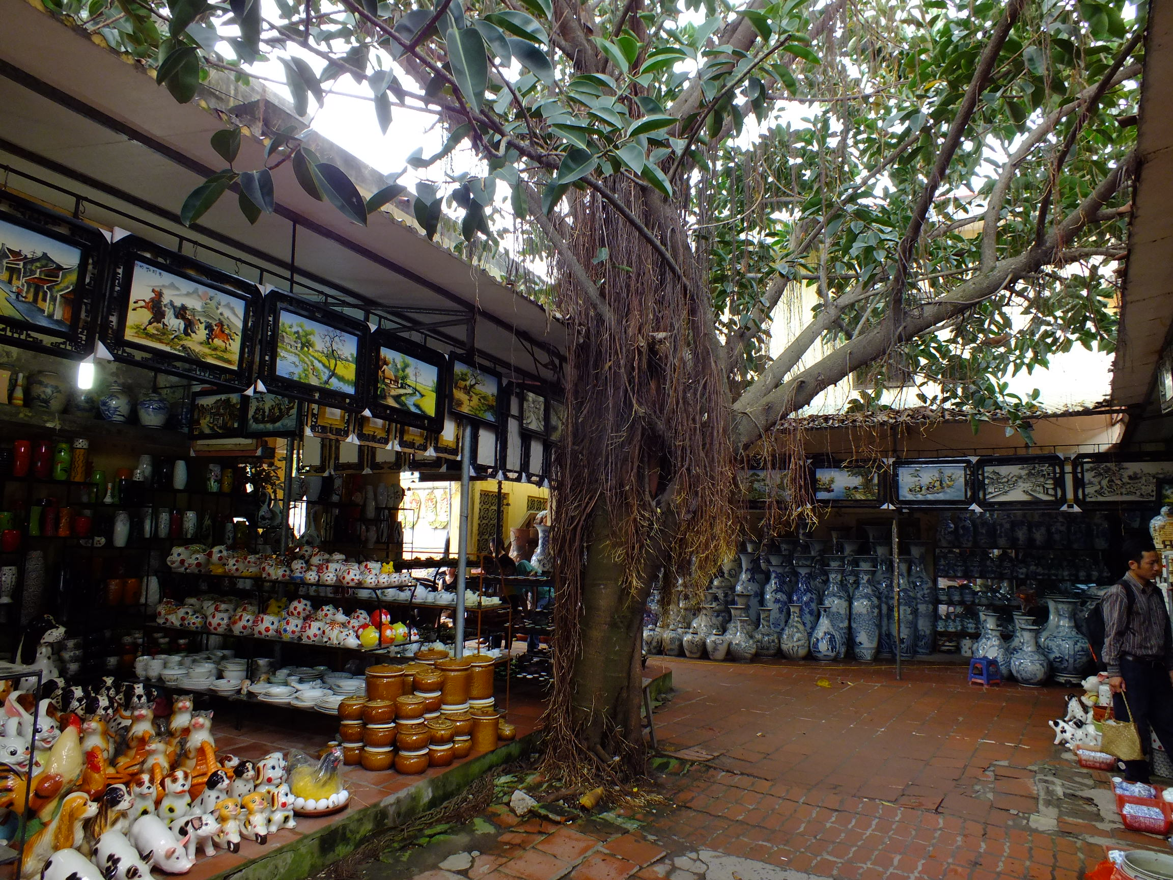 Xã Bát Tràng、 鉢塲社 バチャン村